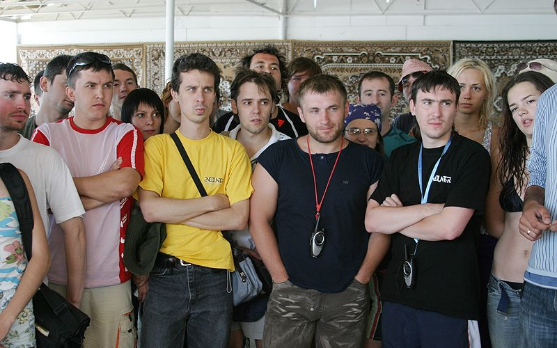 фотография с игры